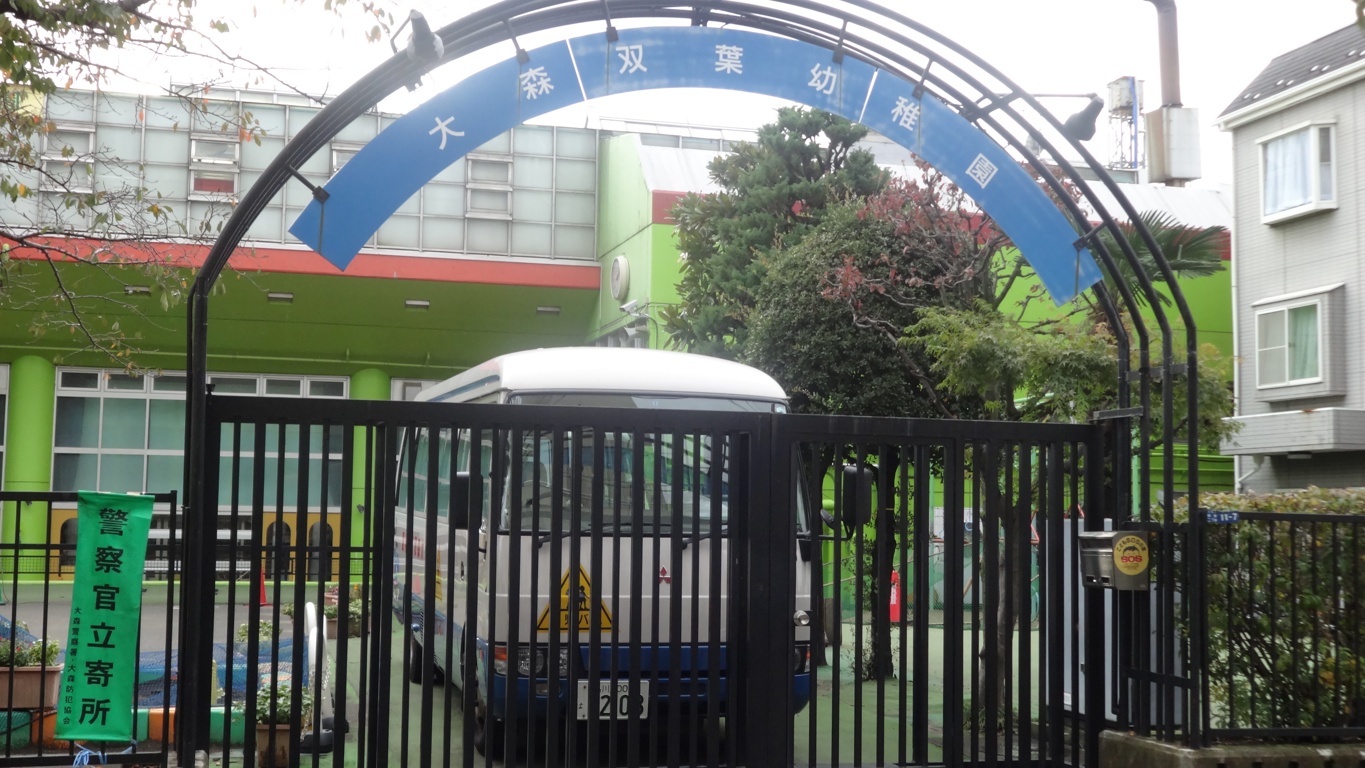 大森双葉幼稚園。投稿者自身による作品。